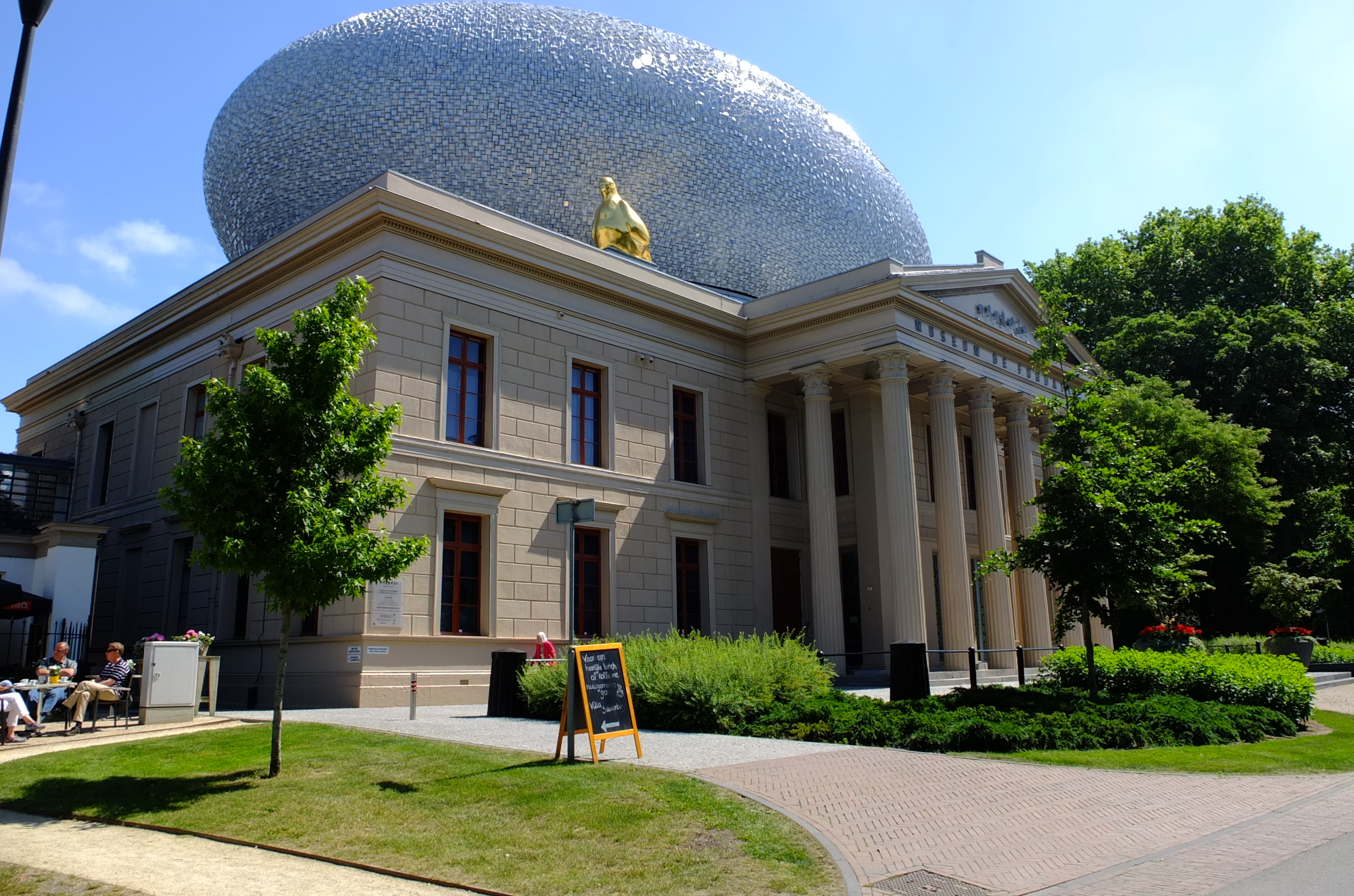 Exterieur Museum de Fundatie